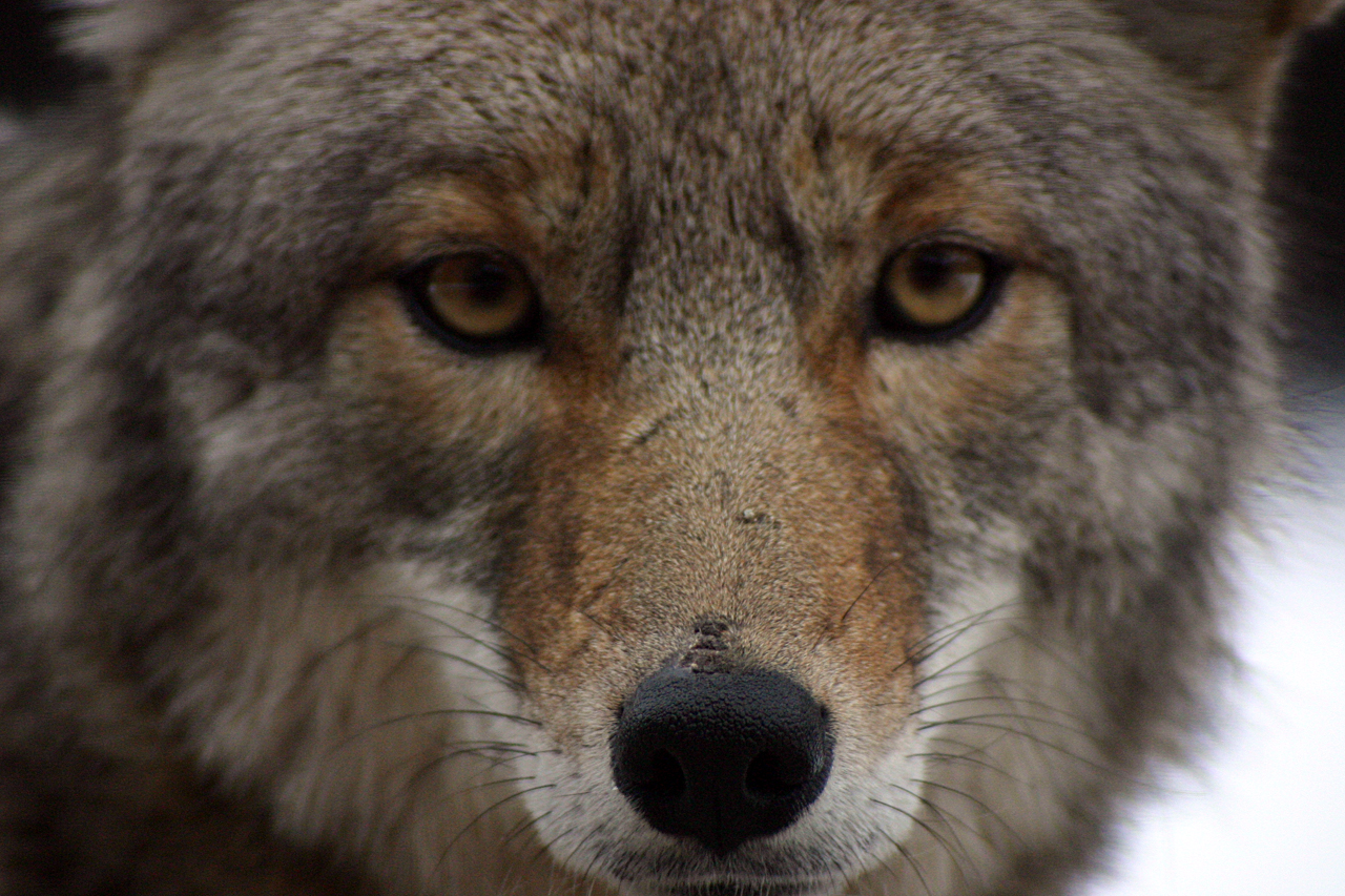 Coyote closeup